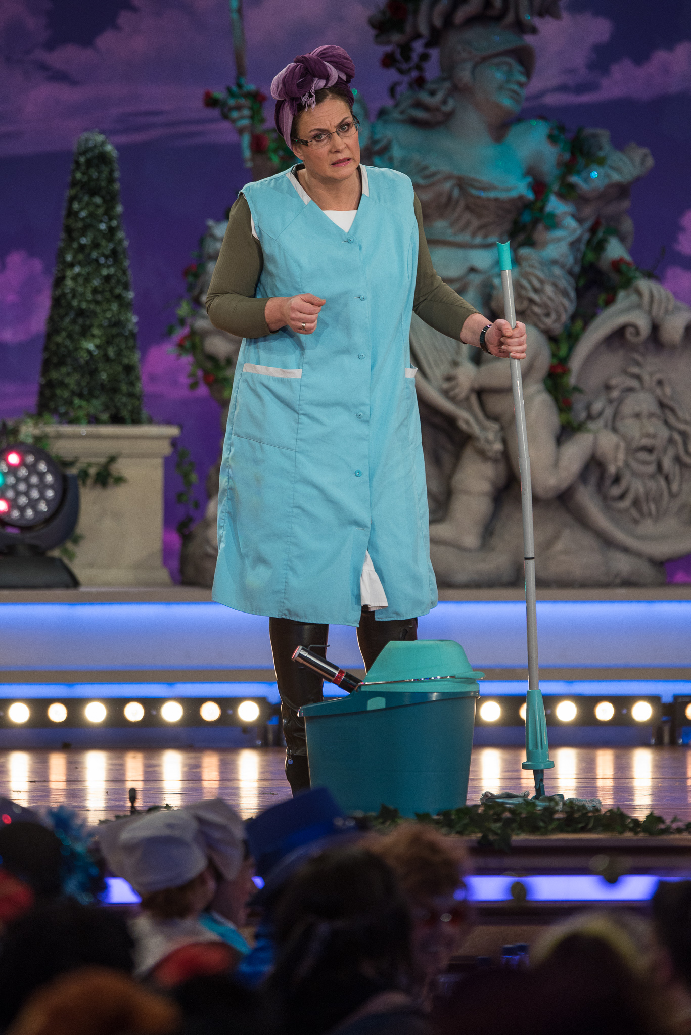 BR,Bayerisches Fernsehen,Fastnacht in Franken,Fastnachts-Verband Franken,Ines Procter,Karneval,Live-Sendung,Mainfrankensäle